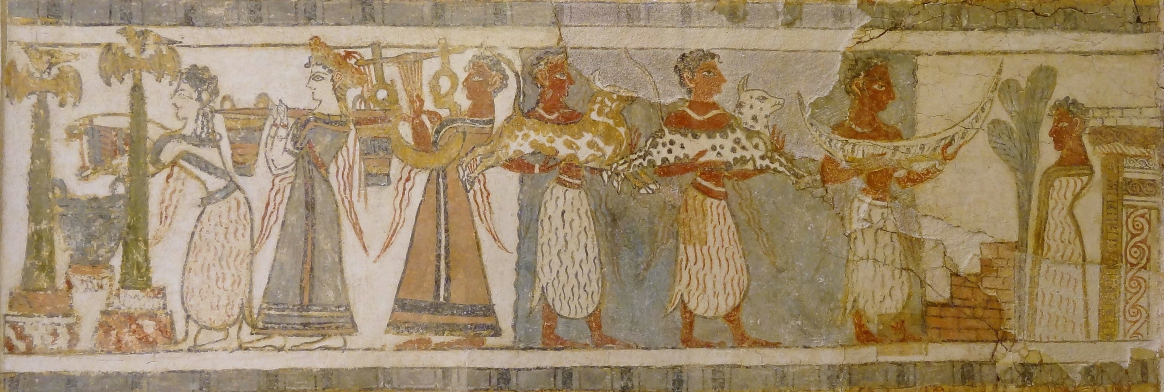 Fresko auf dem Sarkophag von Agia Triada (14. Jahrhundert v. Chr.), ausgestellt im Archäologischen Museum Iraklio, Kreta, Griechenland